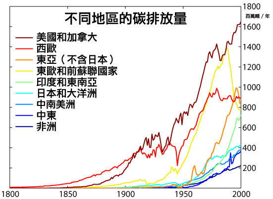 來自英文維基